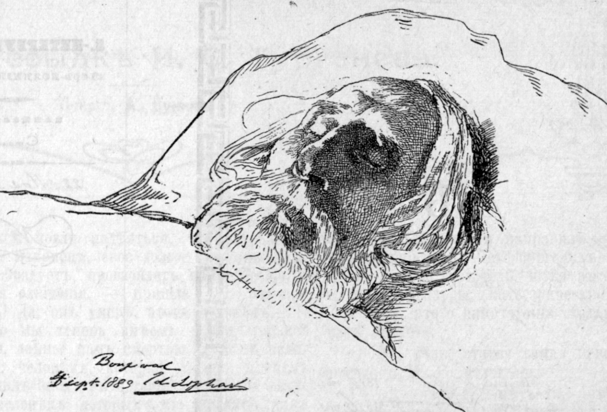 Иван Тургенев на смертном одре. Рисунок, набросанный в Буживале, в день кончины великого писателя, художником Е. Липгардтом